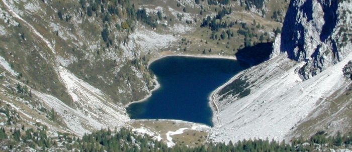 Krnsko jezero, Triglav National Park, Slovenia